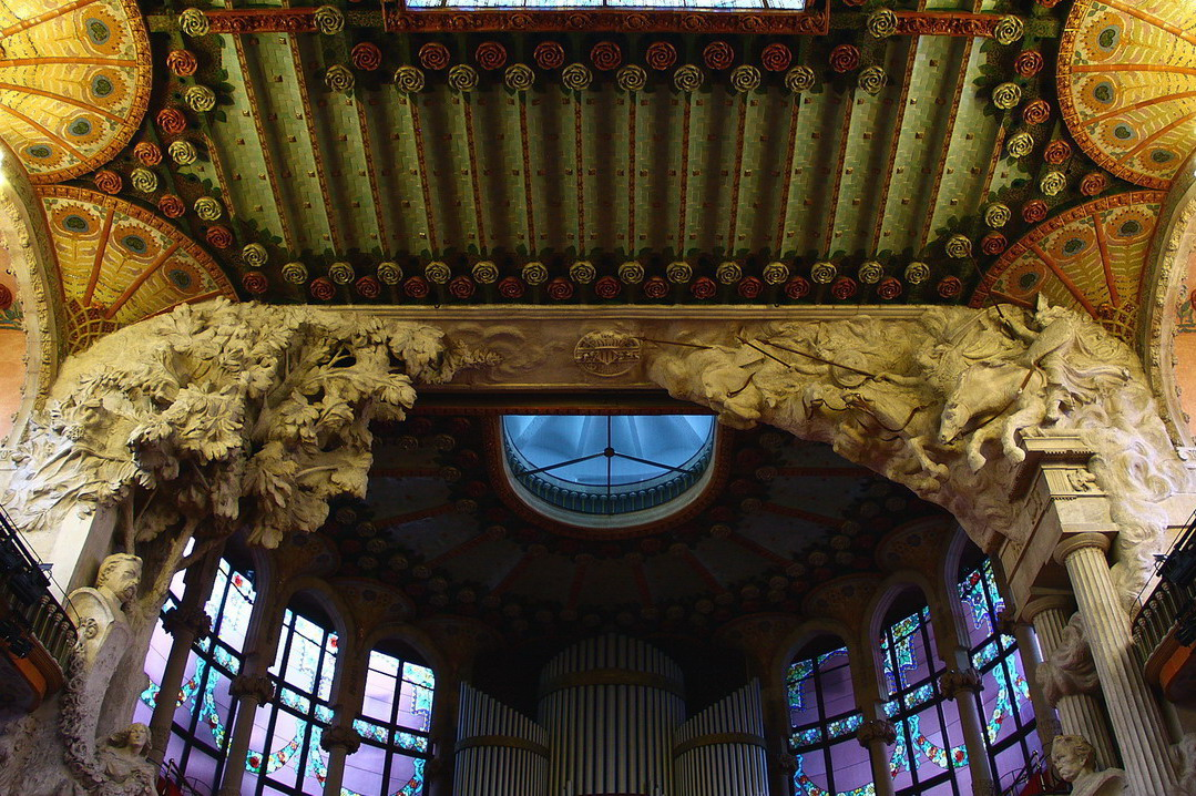 Palau de la Música - Detall escultures boca escenari, obra de Pau Gargallo. Dreta: Beethoven sota la cavalcada de les Valquíries. Esquerra: Josep Anselm Clavé sota un gran arbre als peus del qual es troba un grup de cantors